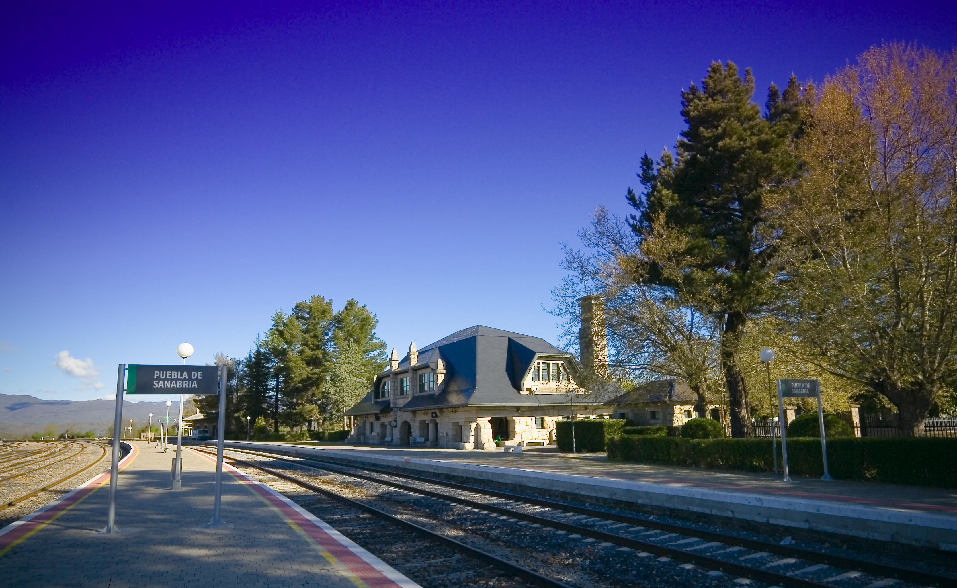 Vista de los andenes